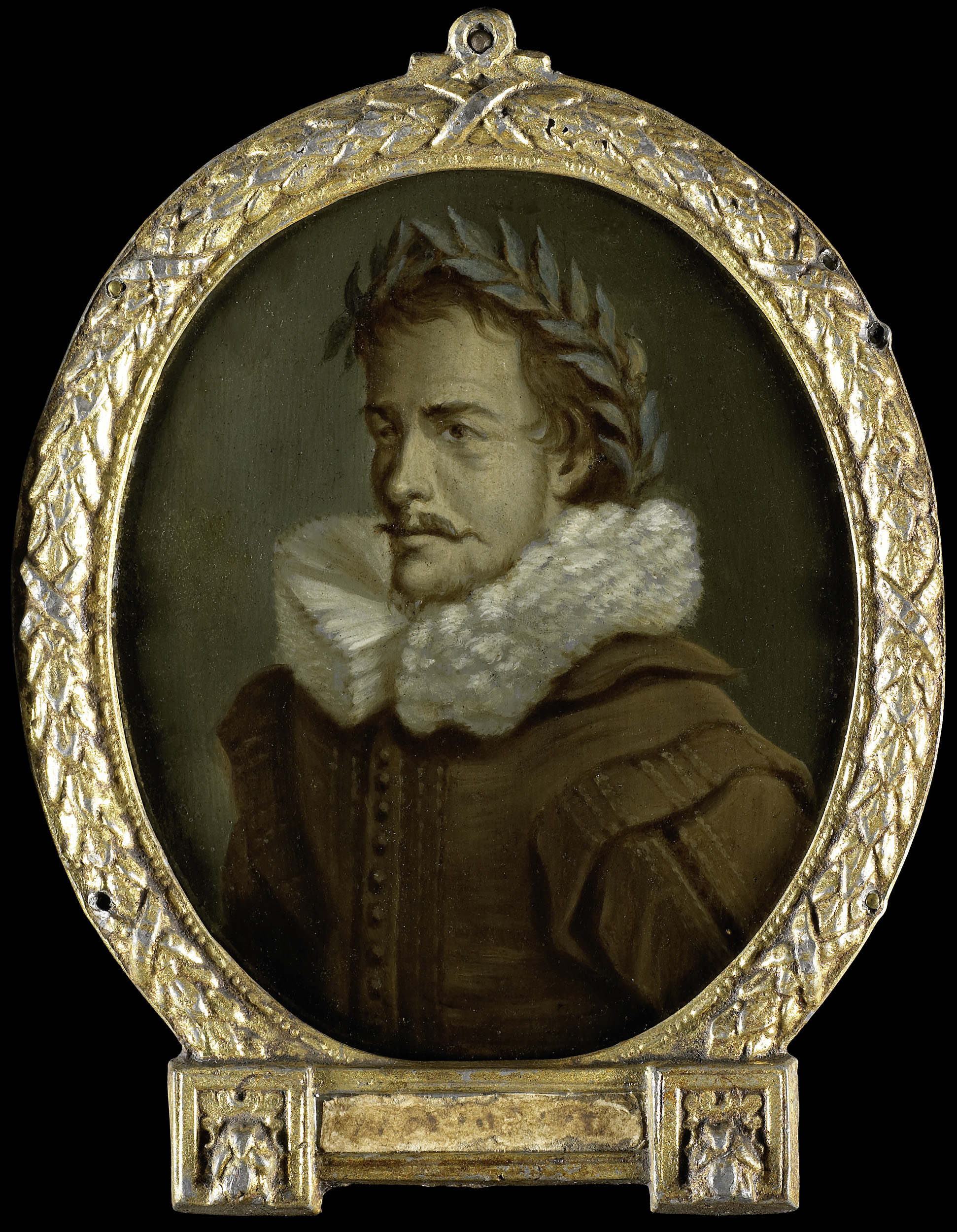 Portret van Jan Jansz Starter (1594-1626). Dichter te Leeuwarden en Amsterdam. Buste naar links, met een lauwerkrans op het hoofd. Onderdeel van een verzameling portretten van Nederlandse dichters. Collection: schilderijen; Panpoeticon Batavum